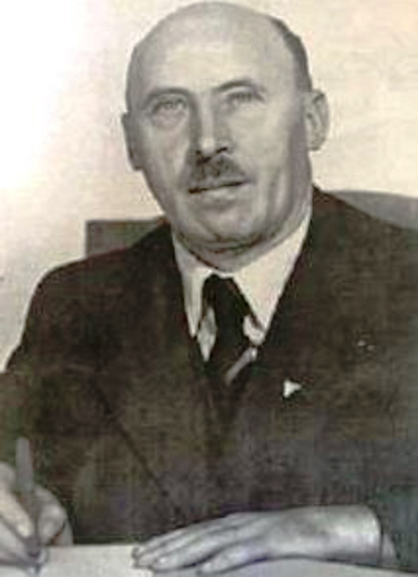 Jan Ursiny